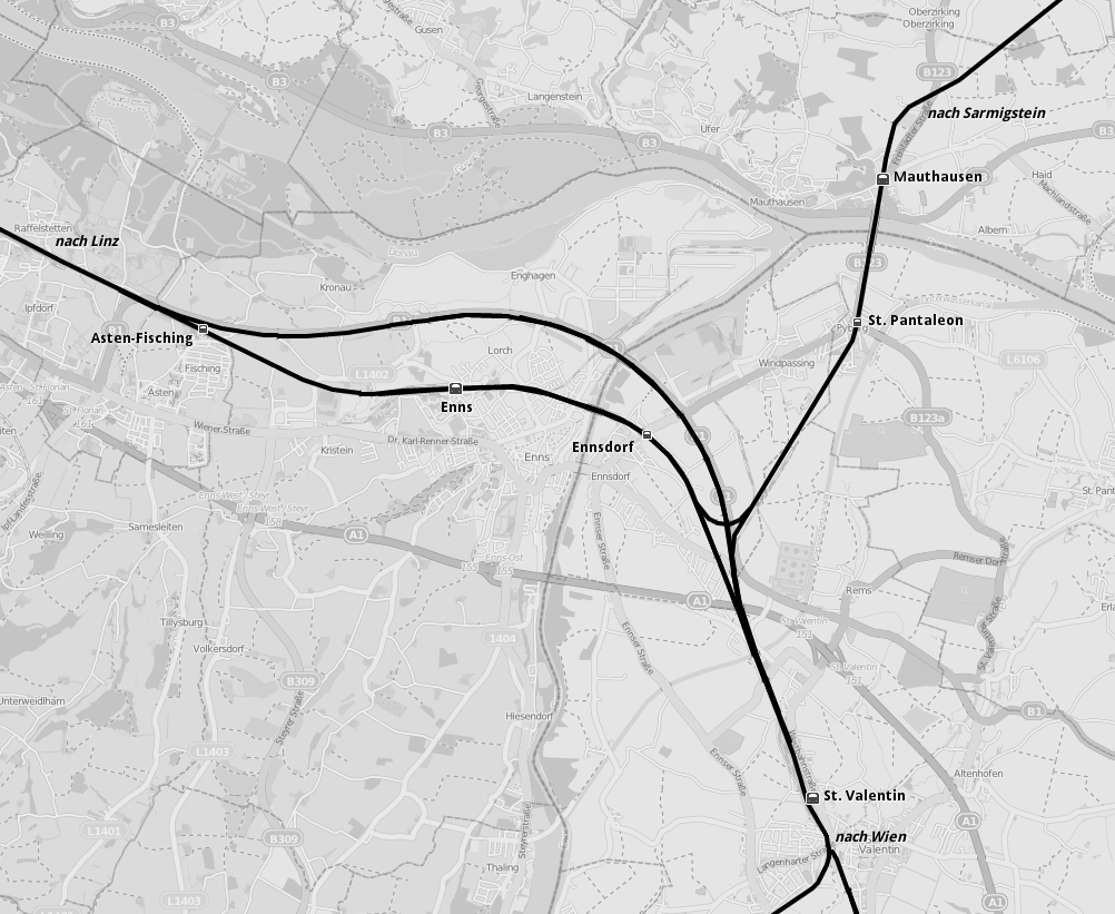 Schleife Ennsdorf This map may be incomplete, and may contain errors. Don't rely solely on it for navigation.